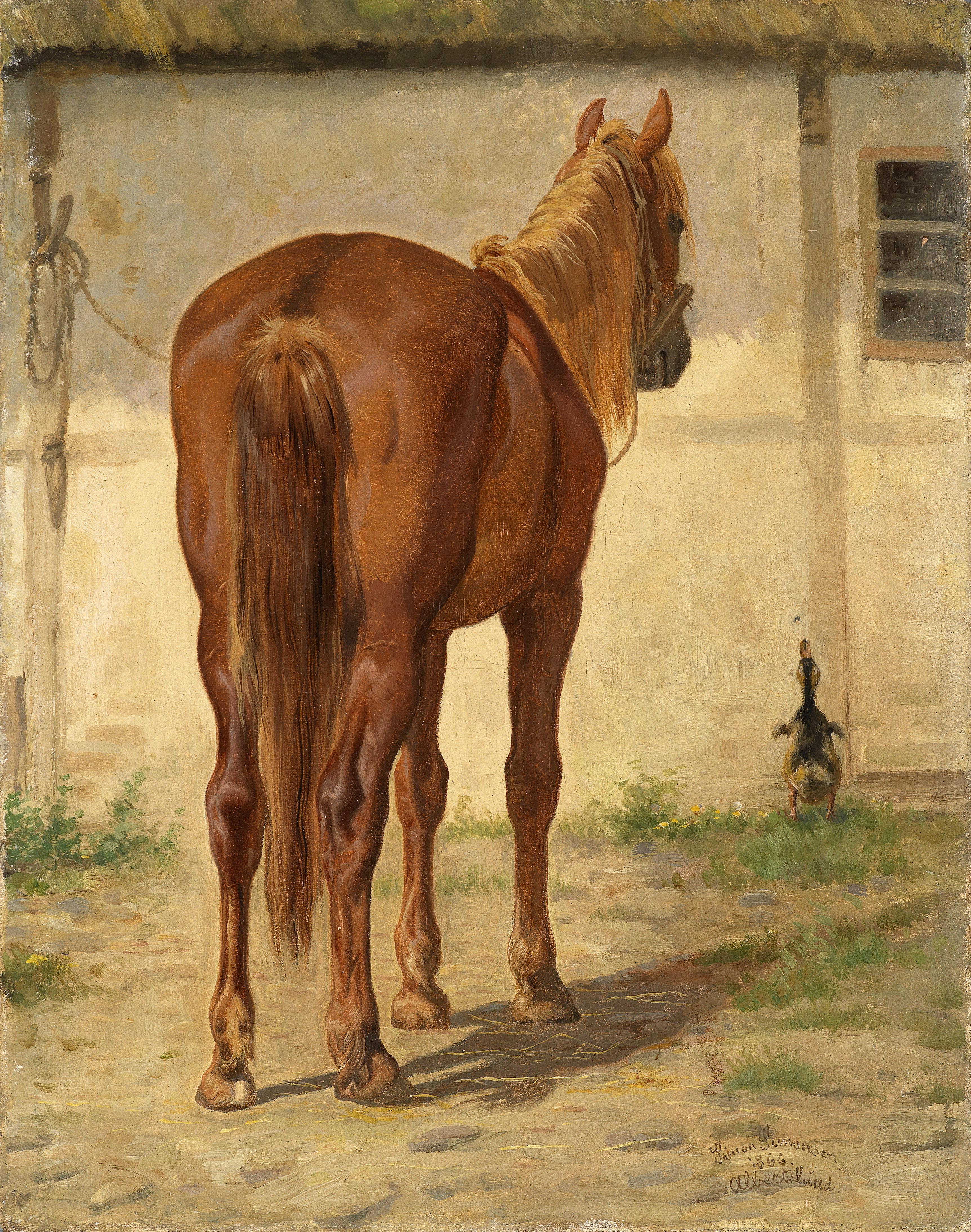 "Rückenansicht", signiert und datiert Simon Simonsen Albertslund 1866, rückseitig am Keilrahmen bezeichnet, Öl auf Leinwand, 29 x 23 cm (Rückenansicht eines Pferds und einer Ente)